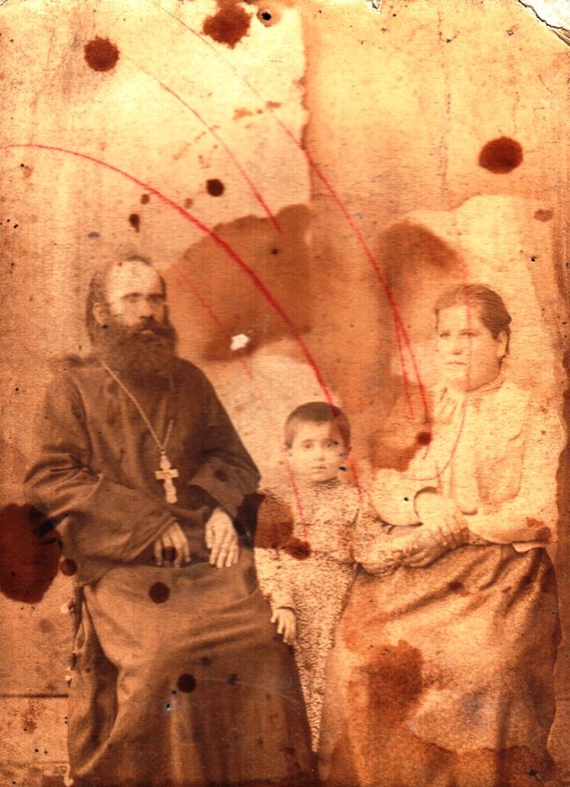 Викладач закону божого - піп Михайло Лабуниця